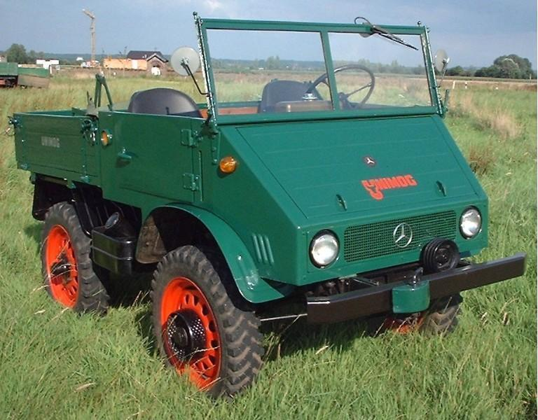 Fotografie meines eigenen Unimog 401 Baujahr 1954.